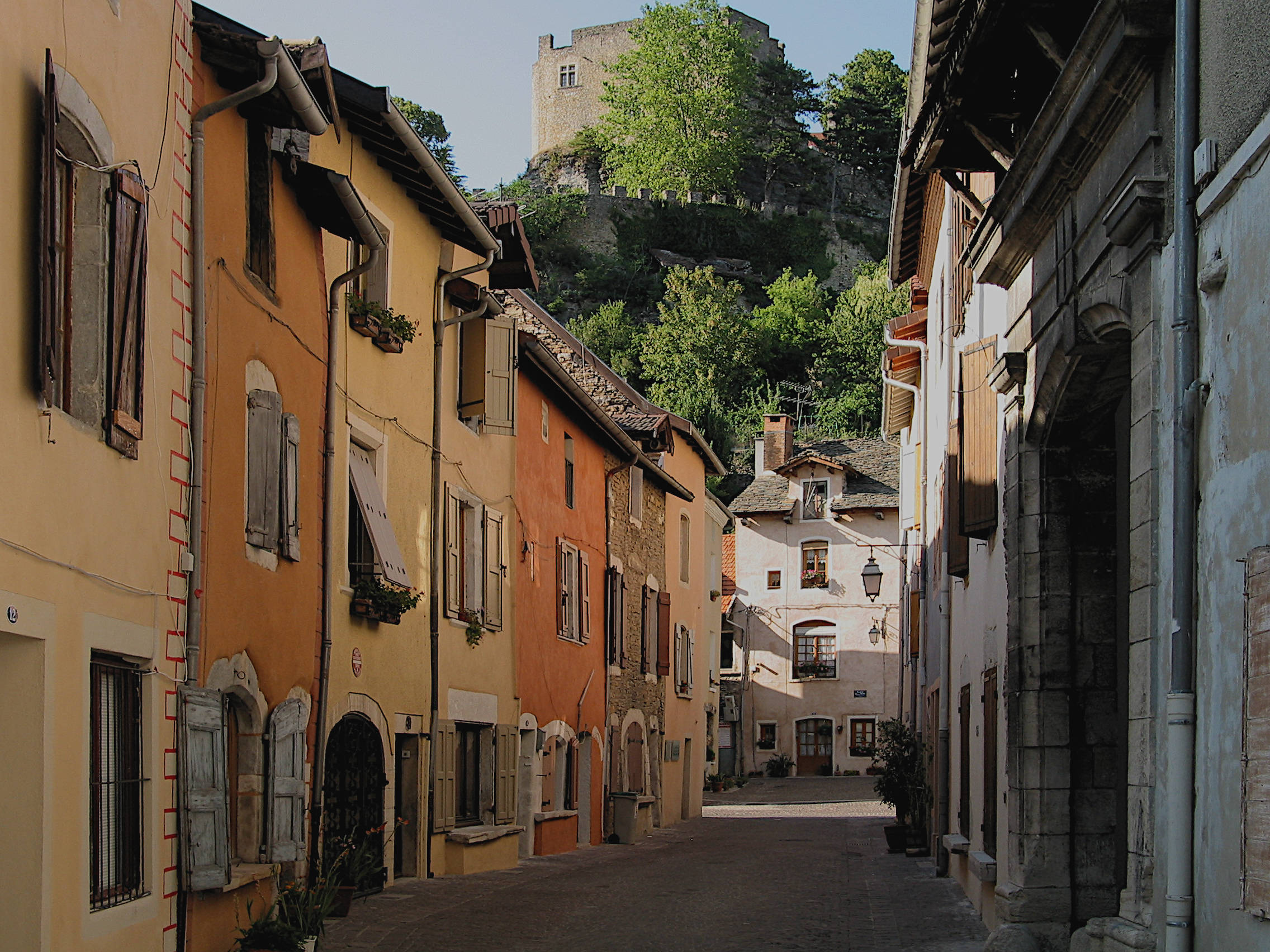 France, Crémieu, Rue médiévale, medieval street